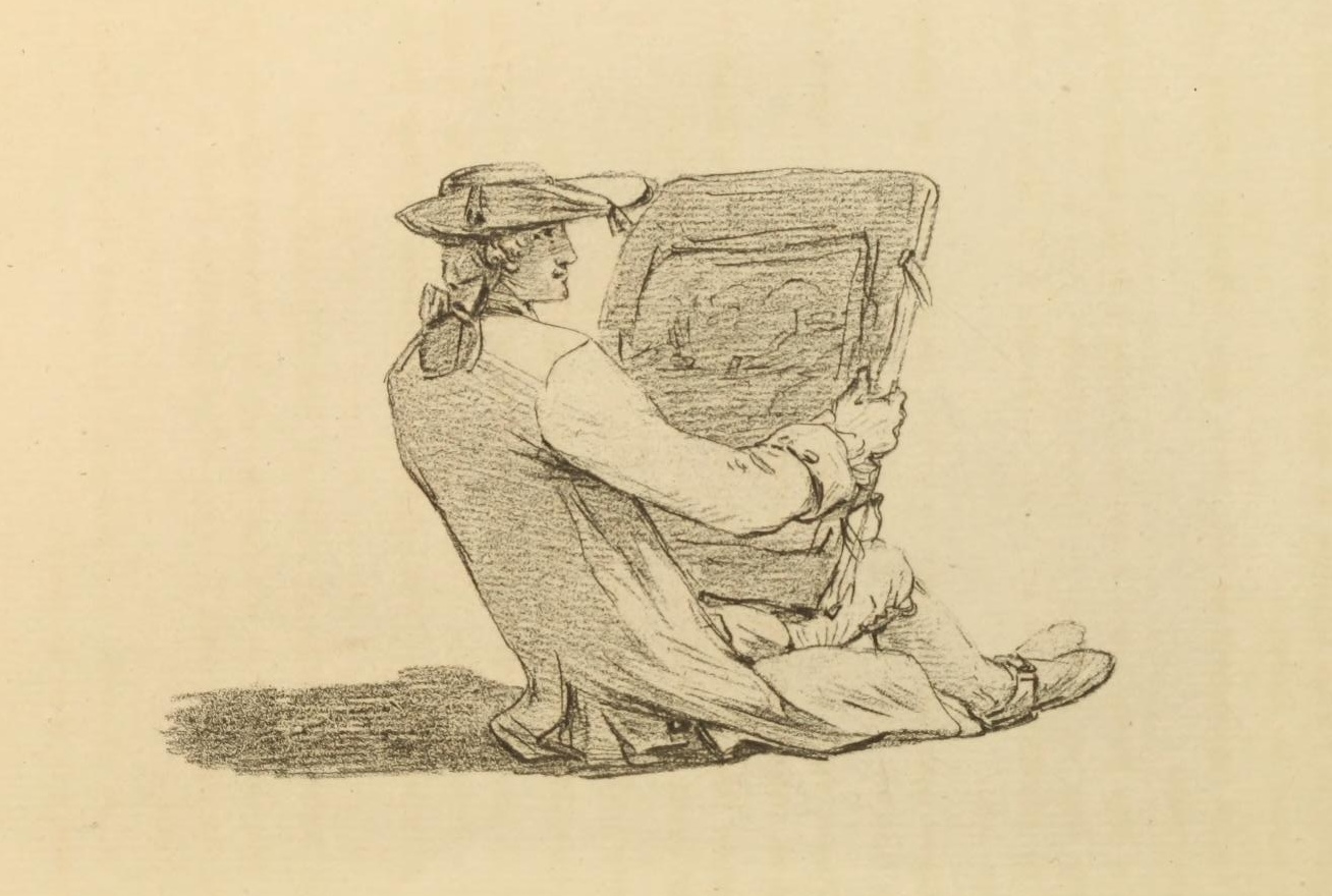 Nicolas Ozanne au travail. Dessin de Pierre Ozanne. Sans date. Fac-similé publié en 1891.